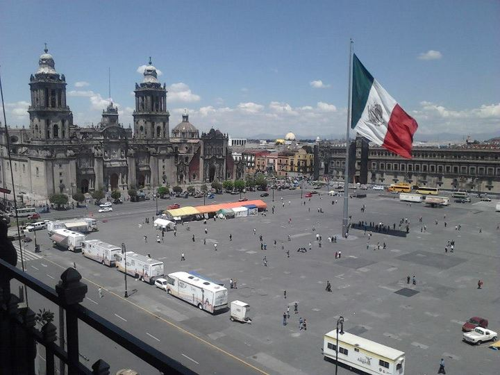 El monumento colonial más importante de Latinoamerica, la Catedral Metropolitana de la Ciudad de México